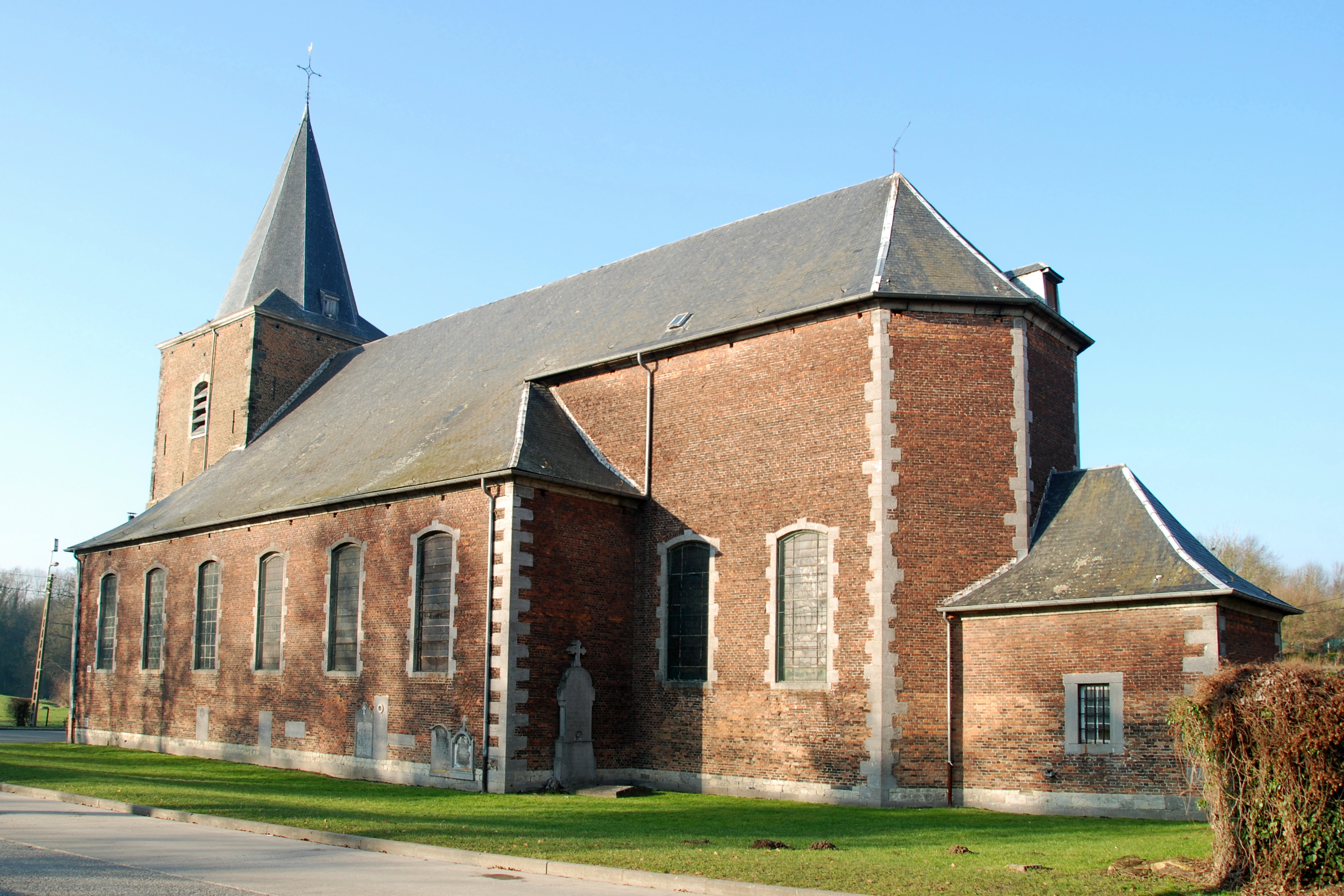 Belgique - Brabant wallon - Église Saint-Martin de Ways